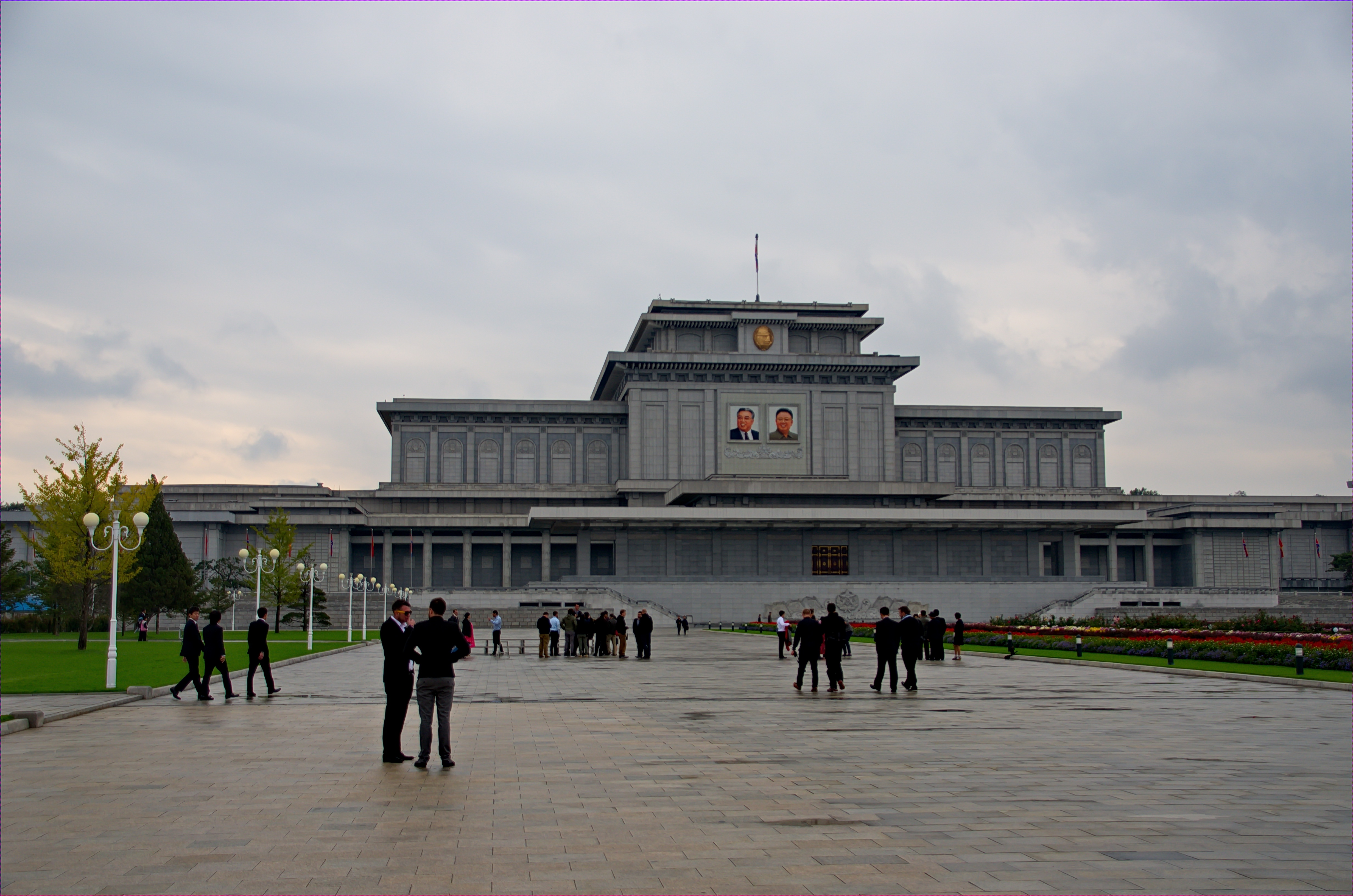 Nordkorea 2015 - Pjöngjang - Mausoleum